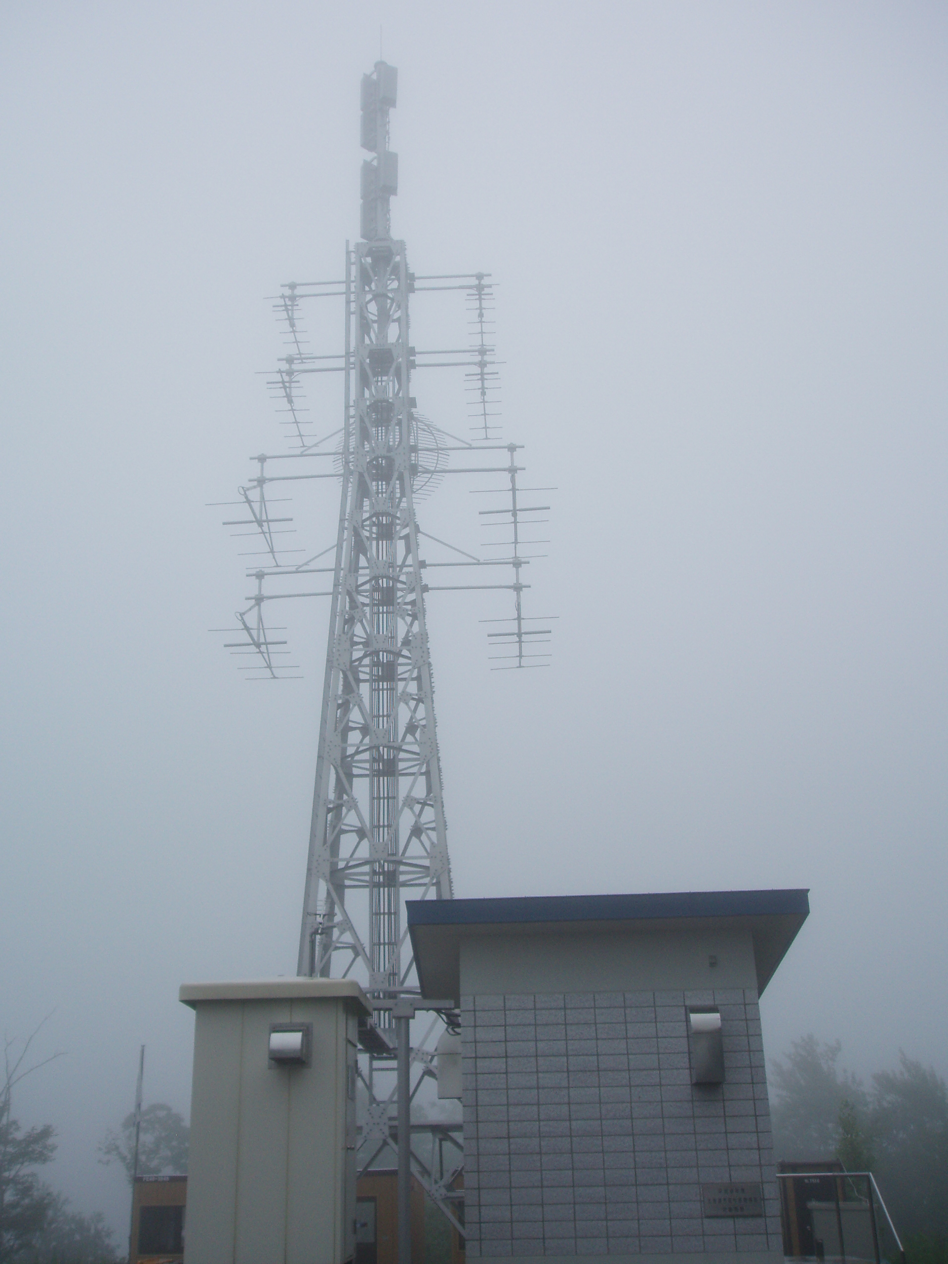 佐呂間知来中継局 NHK・HBC・STV・HTB・UHB送信設備